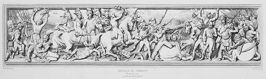 Bas Relief de la bataille de Jemmapes sur l'arc de triomphe, par Carlo Marocchetti